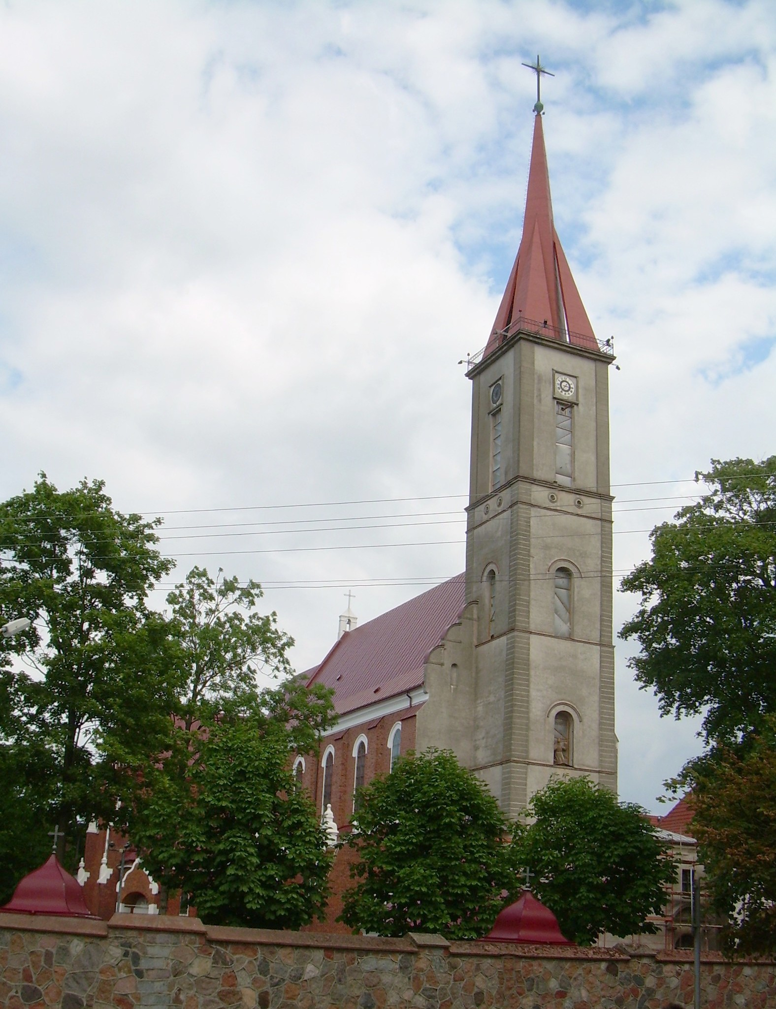 Kretingos Viešpaties Apreiškimo Švč. Mergelei Marijai bažnyčiaБеларуская (тарашкевіца): Касьцёл Зьвеставаньня Найсьвяцейшай Панны Марыі (Крэтынга)